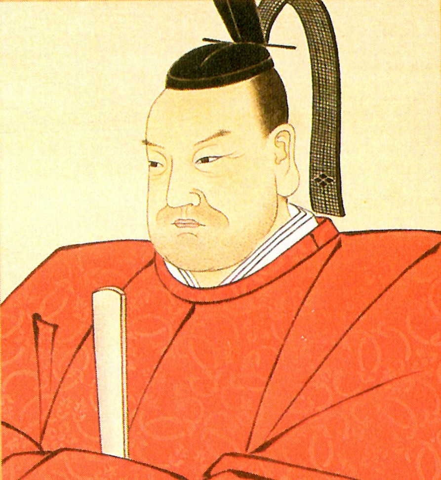 Basa Jawa: 遠山友寿の肖像。